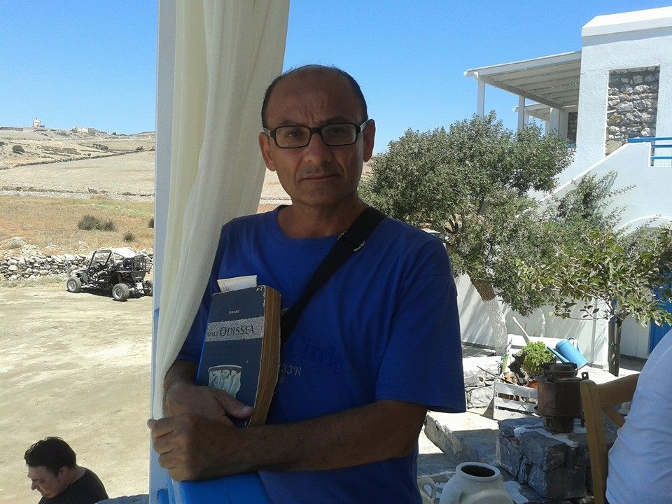 Enzo Di Pasquale in Grecia Corso Di Scrittura "Sulle tracce dell'Odissea"